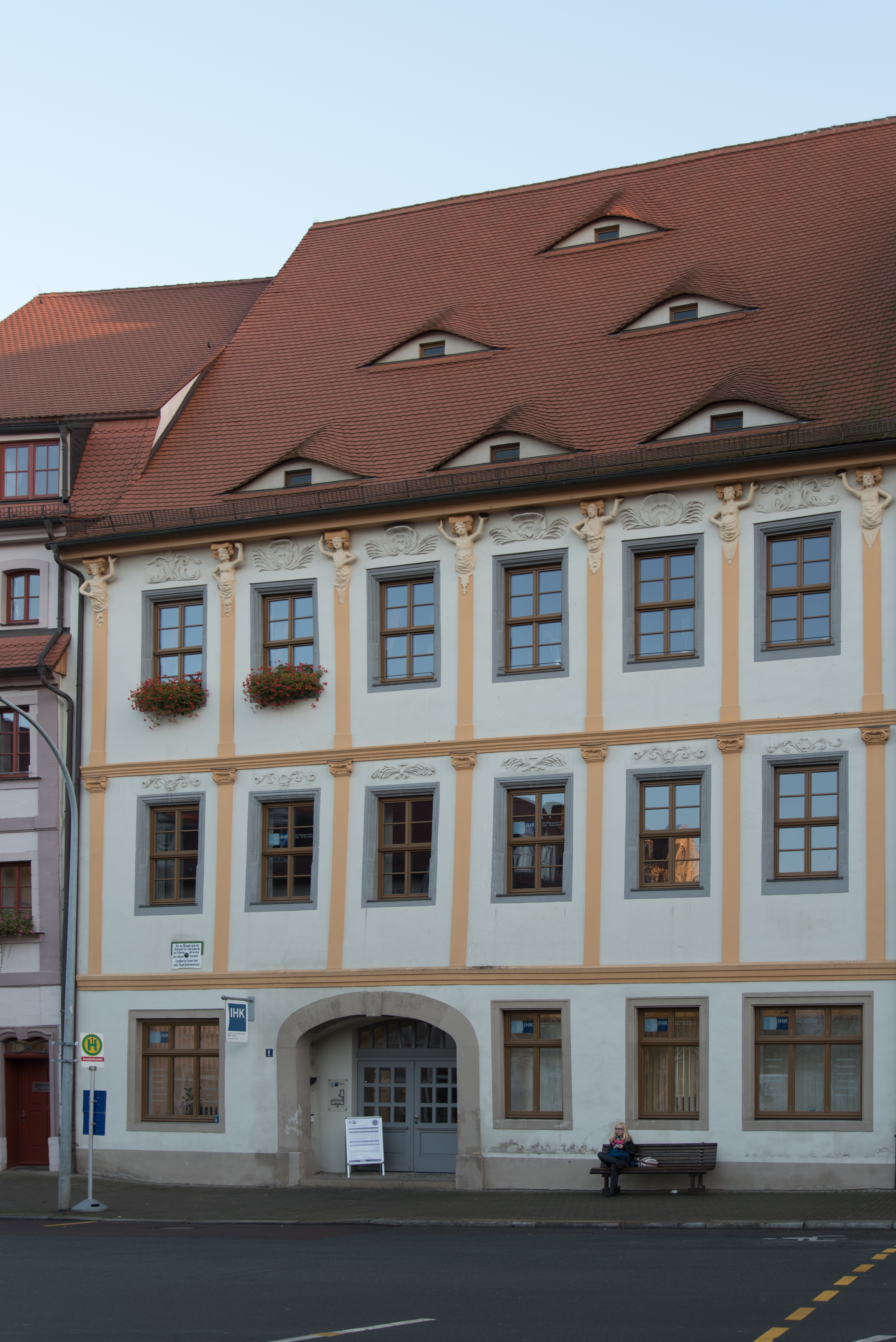 Weißenfels, Markt 6